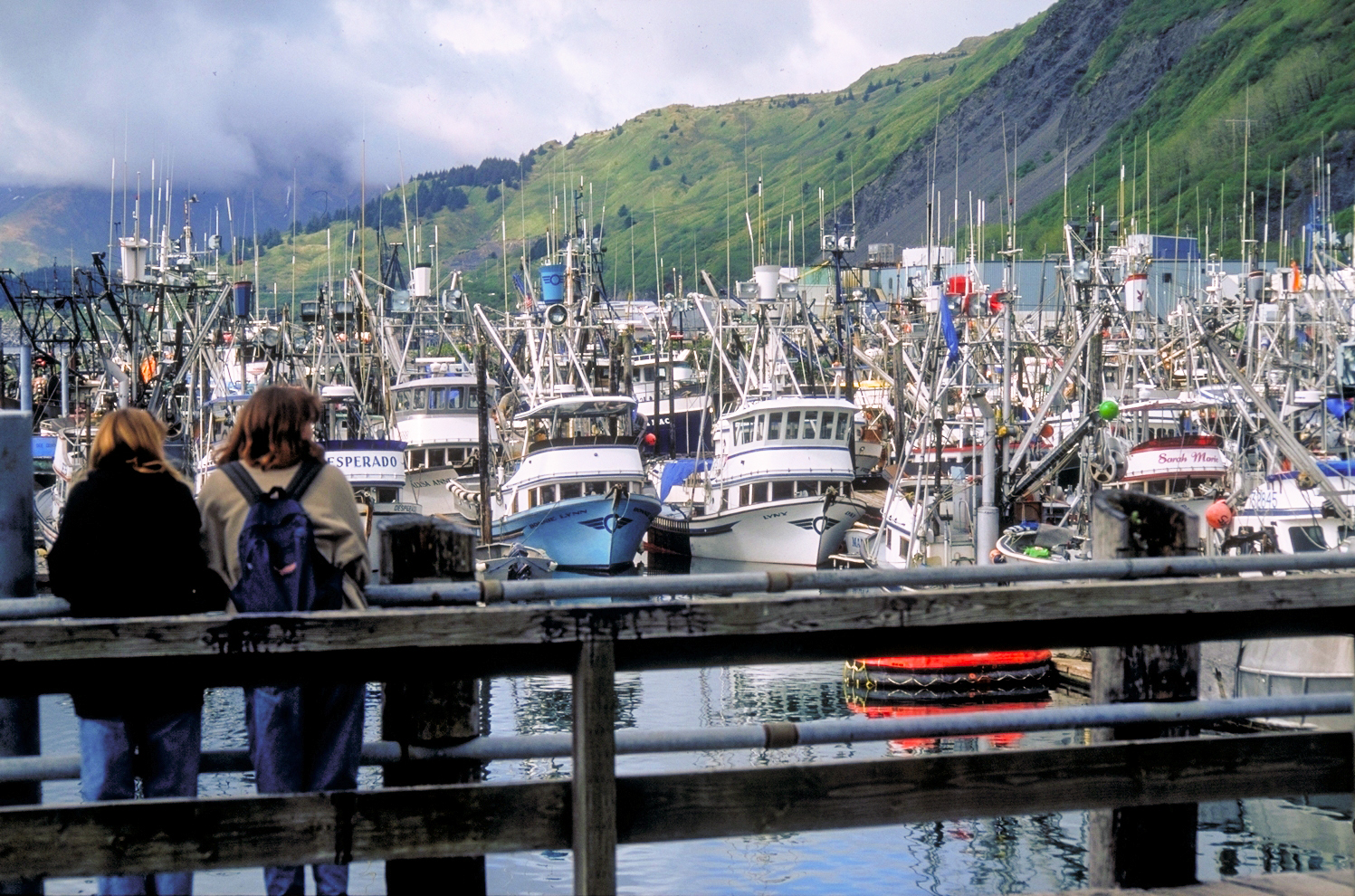 Harbor of Kodiak, Alaska.